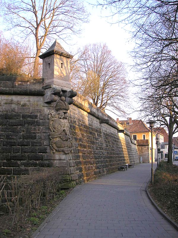 Festung Forchheim (Oberfranken). St. Petri-Werk. Eigene Aufnahme, März 2006 / Fortress Forchheim (Upper Franconia, Germany). Bastion St. Petri. Own photo, March 2006